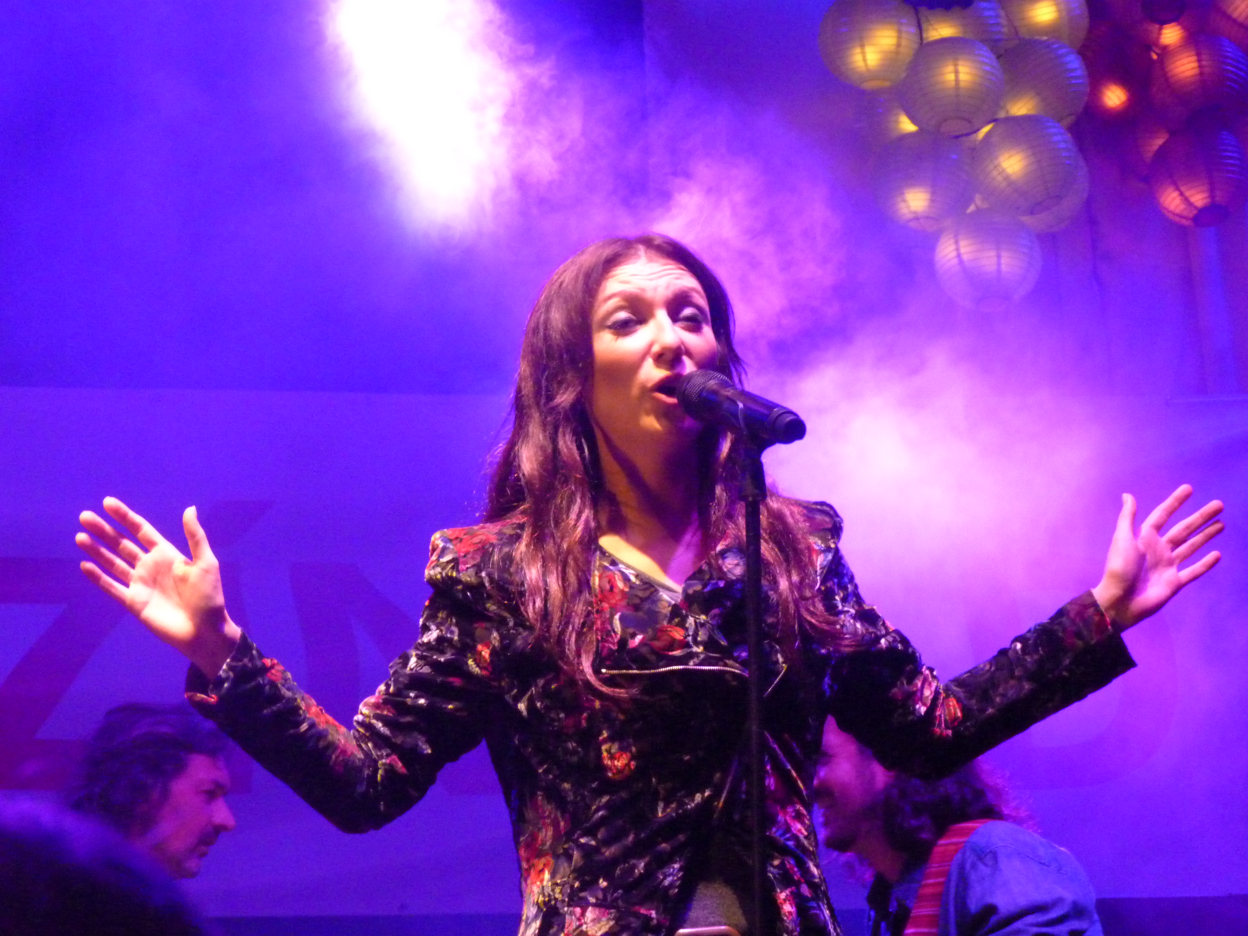 A felvétel 2014. szeptember 12-én, pénteken készült Budapesten, a 23. Budavári Borfesztiválon. Nagyszínpad, Rúzsa Magdi. Források Bor és Pia borpiaci szakmai magazin 2014. augusztus Borfesztivál Melléklet 23. Budavári Borfesztivál kiállítási tájékoztató ©© Derzsi Elekes Andor, Budapest, 2014, A kép és filmfelvételek egészben, vagy részletekben másolását, bármilyen úton történő sokszorosítását és felhasználását a szerző ellenérték nélkül, jogutódjaira is kihatóan megengedi. Az engedély kiterjed a kereskedelmi célú hasznosításra is. Kéri azonban nevének feltüntetését a felhasználás során. A Metapolisz sorozat valamennyi képe és filmje Creative Commons alatti valamint kereskedelmi - for profit - célra is felhasználható. Ajánlott hivatkozás: Derzsi Elekes Andor: Metapolisz DVD line